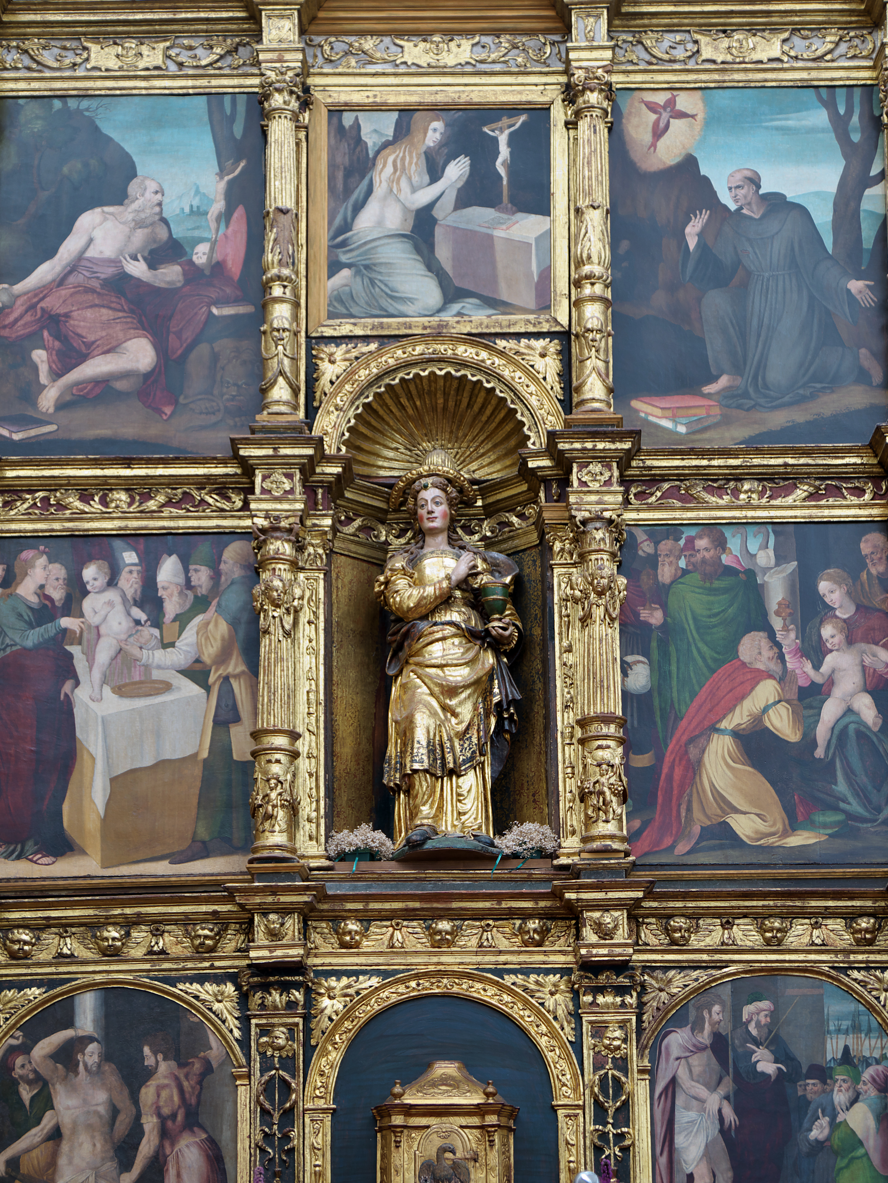 Iglesia de Santa María Magdalena, Tarazona. Pietro Morone pinta sobre tablas (h. 1566) el interesante retablo de Martín de Ahumel.